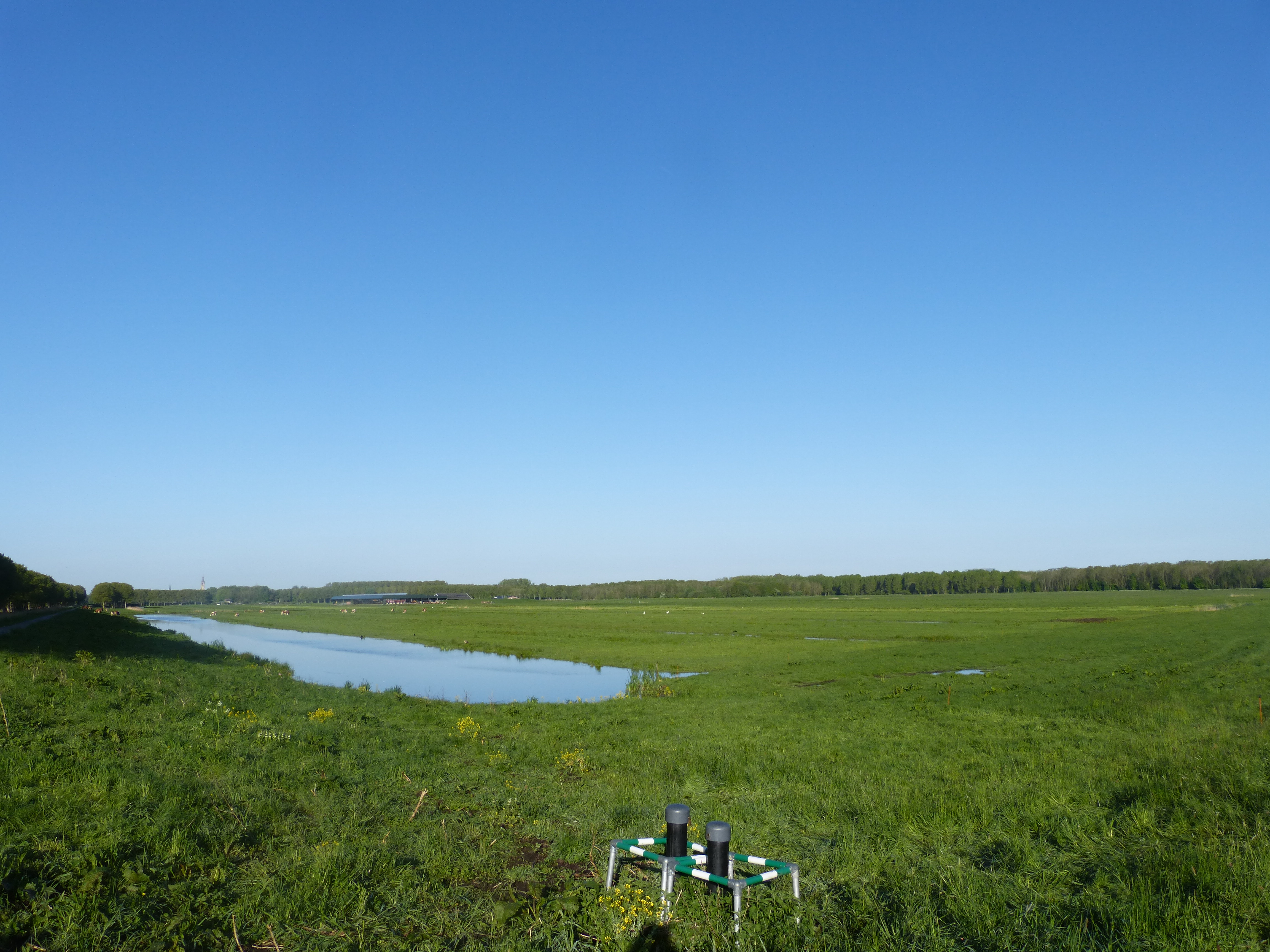 Overzicht van de Benedenpolder van Biesland, vanaf de hoek van de Noordkade en het Virulypad